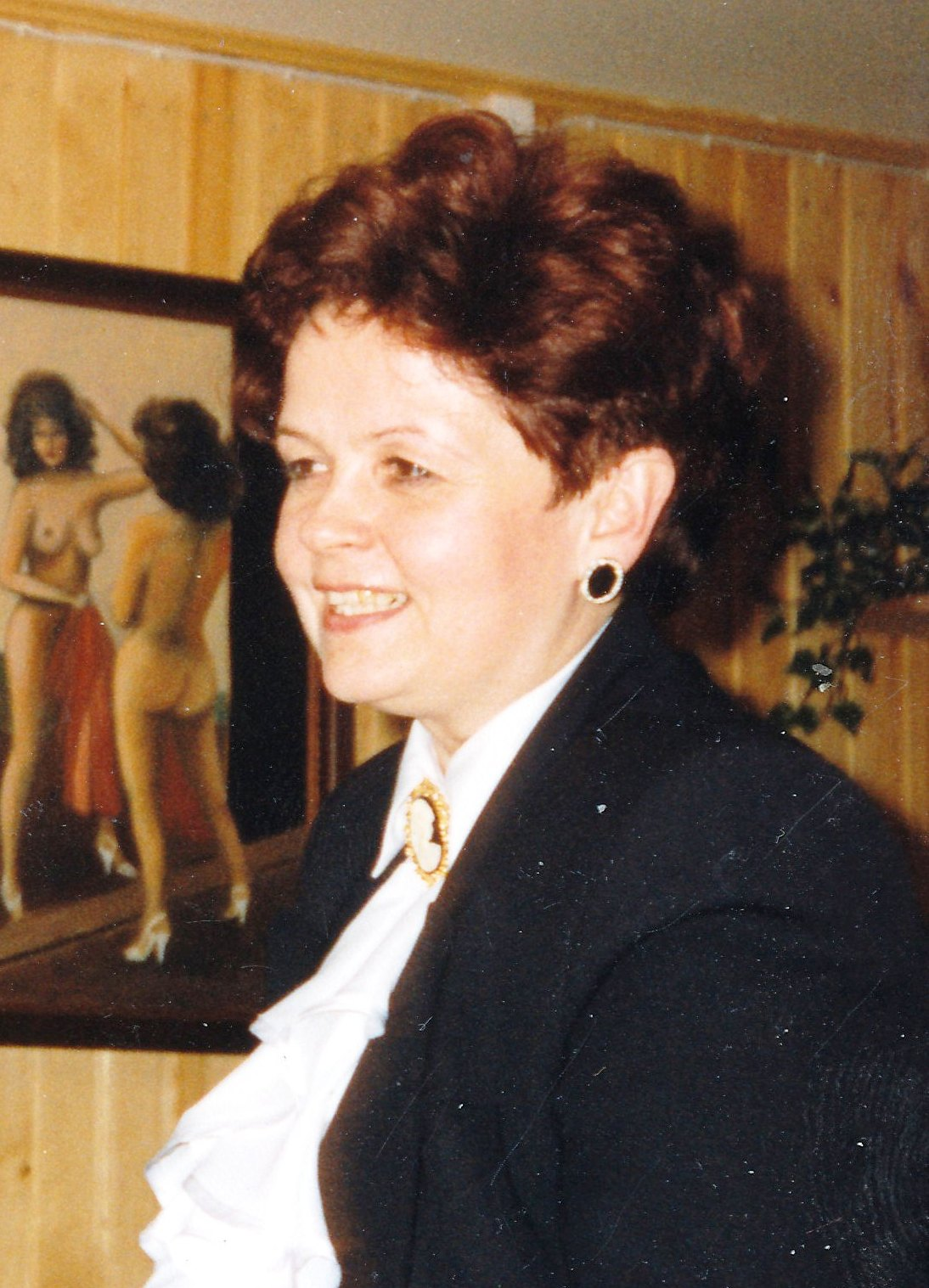 Arengupartei esinaine Andra Veidemann